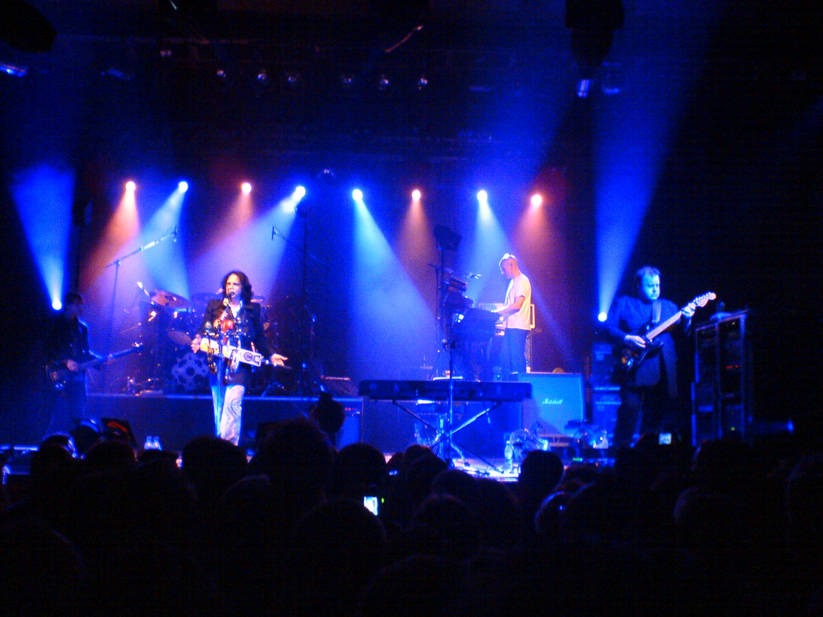 Marillion w Warszawskiej Stodole - 22 maja 2007